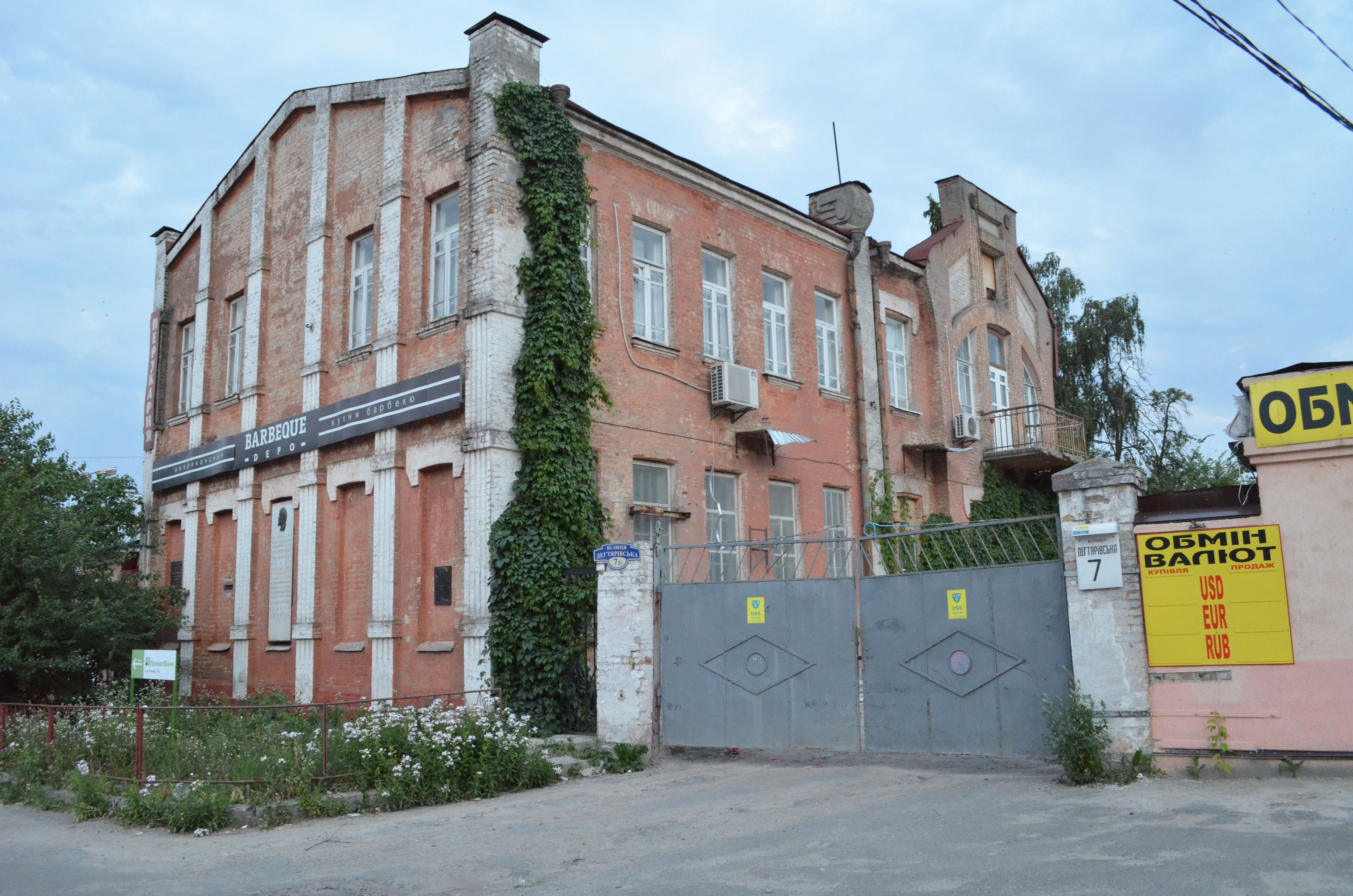 Вулиця Дегтярівська (Київ)